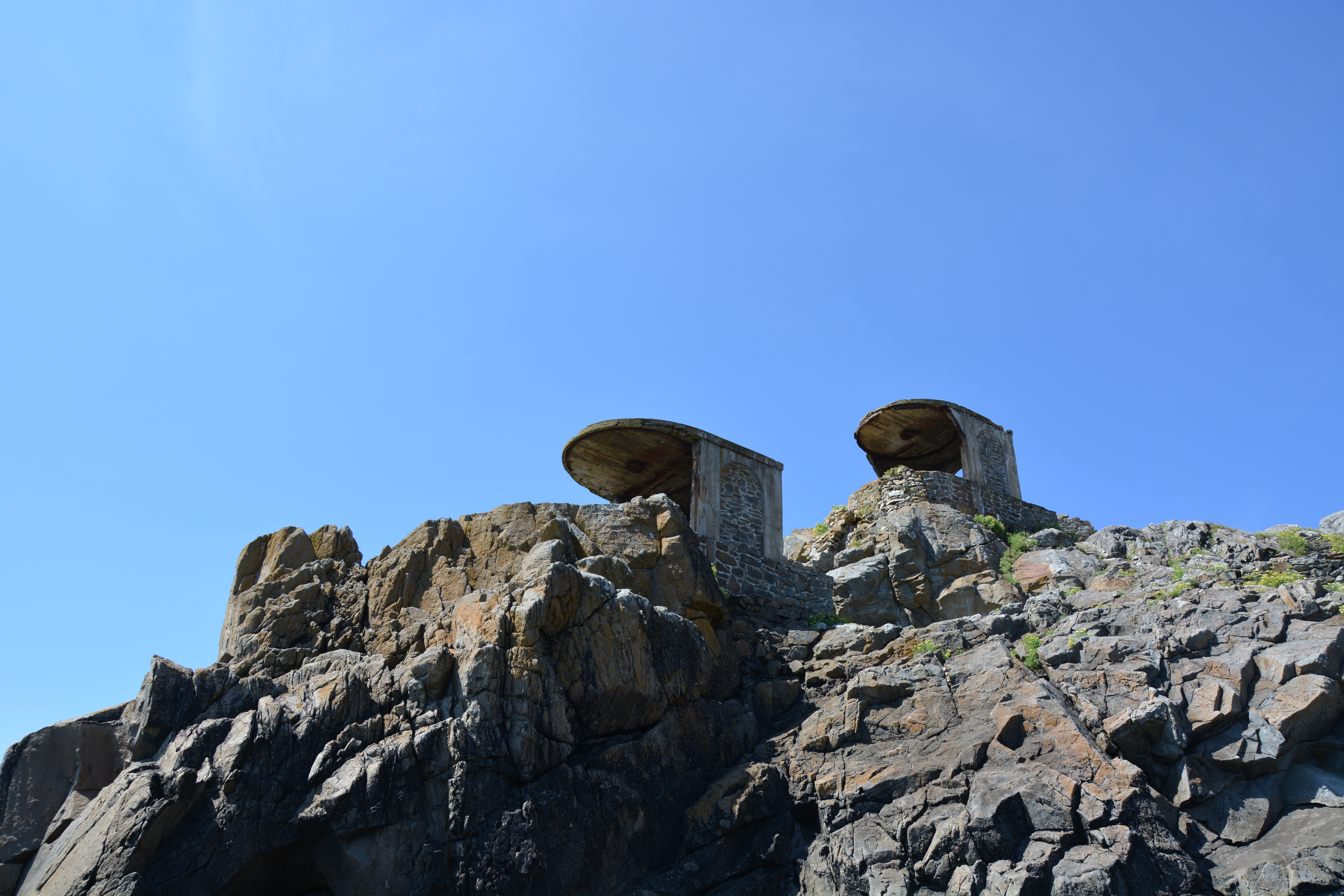 Position du Créac’h Meur, casemates en béton pour projecteurs et abris en béton finis en avril 1914